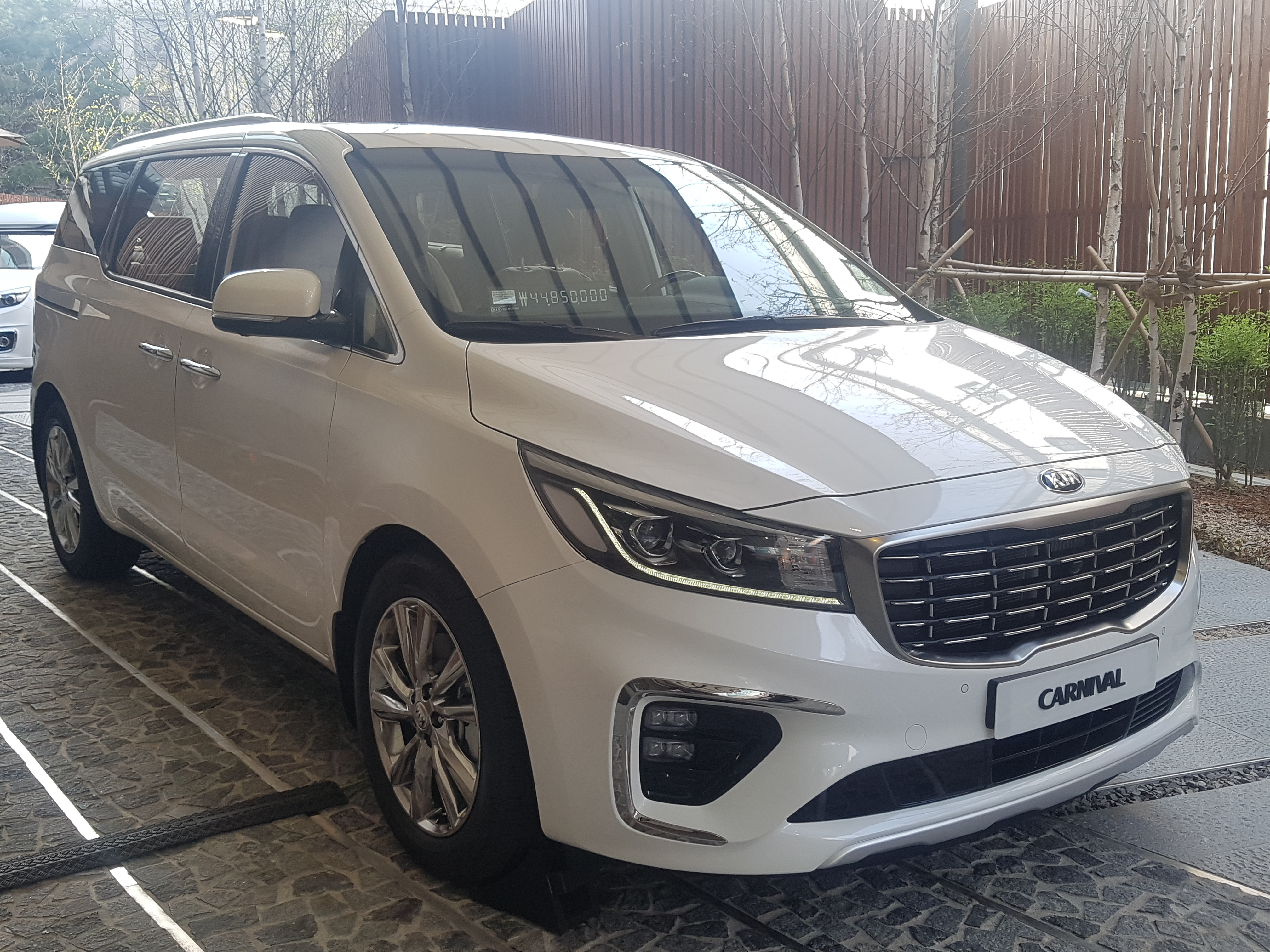 기아 더 뉴 카니발 정측면